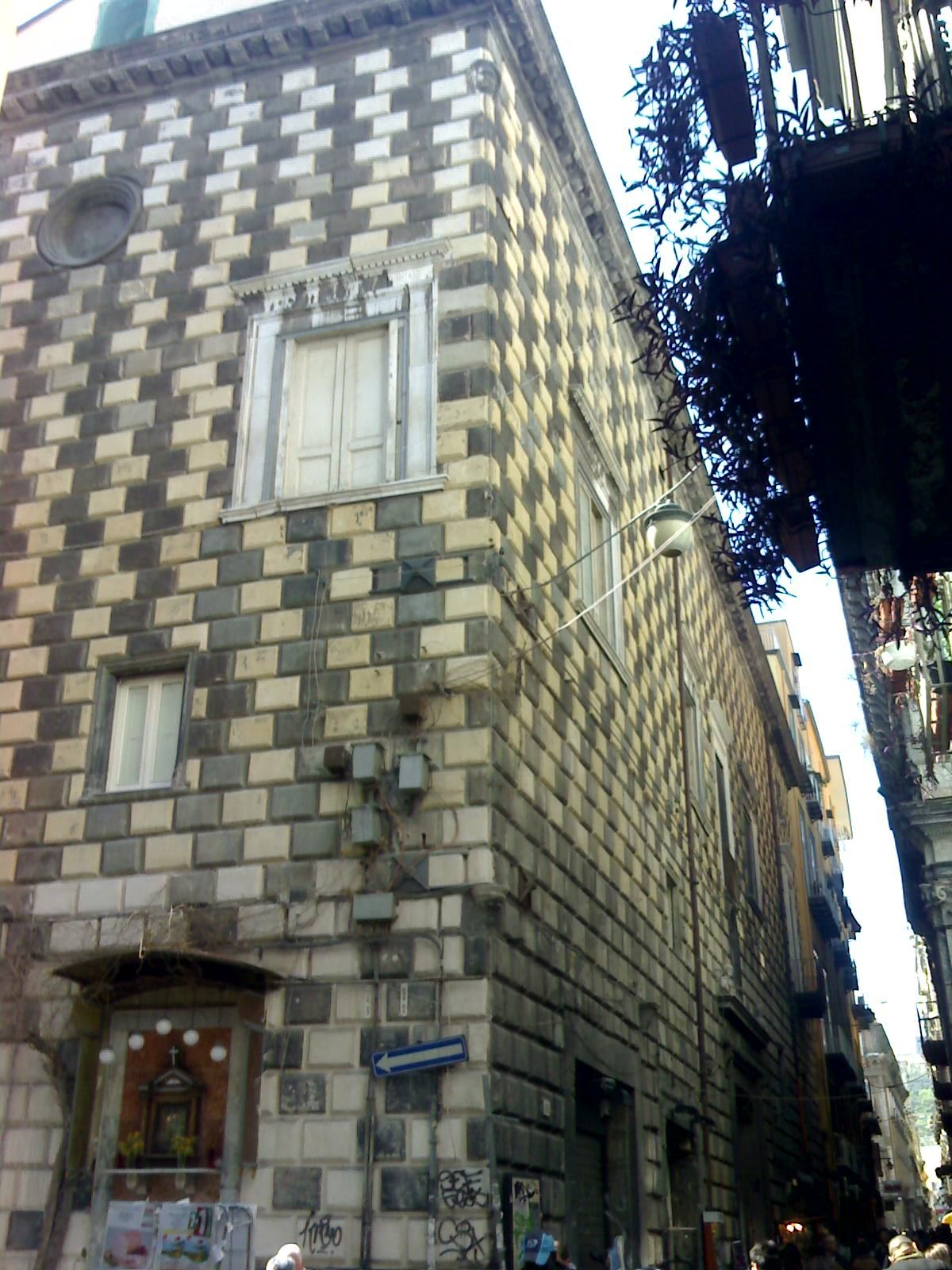 Facciata del palazzo Diomede Carafa (Napoli)